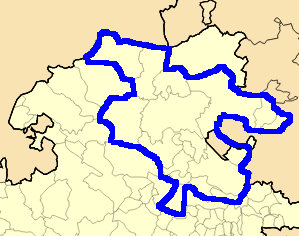 Territorio aproximado que ocuparía el Área Paterniani dentro de la actual provincia de Burgos.